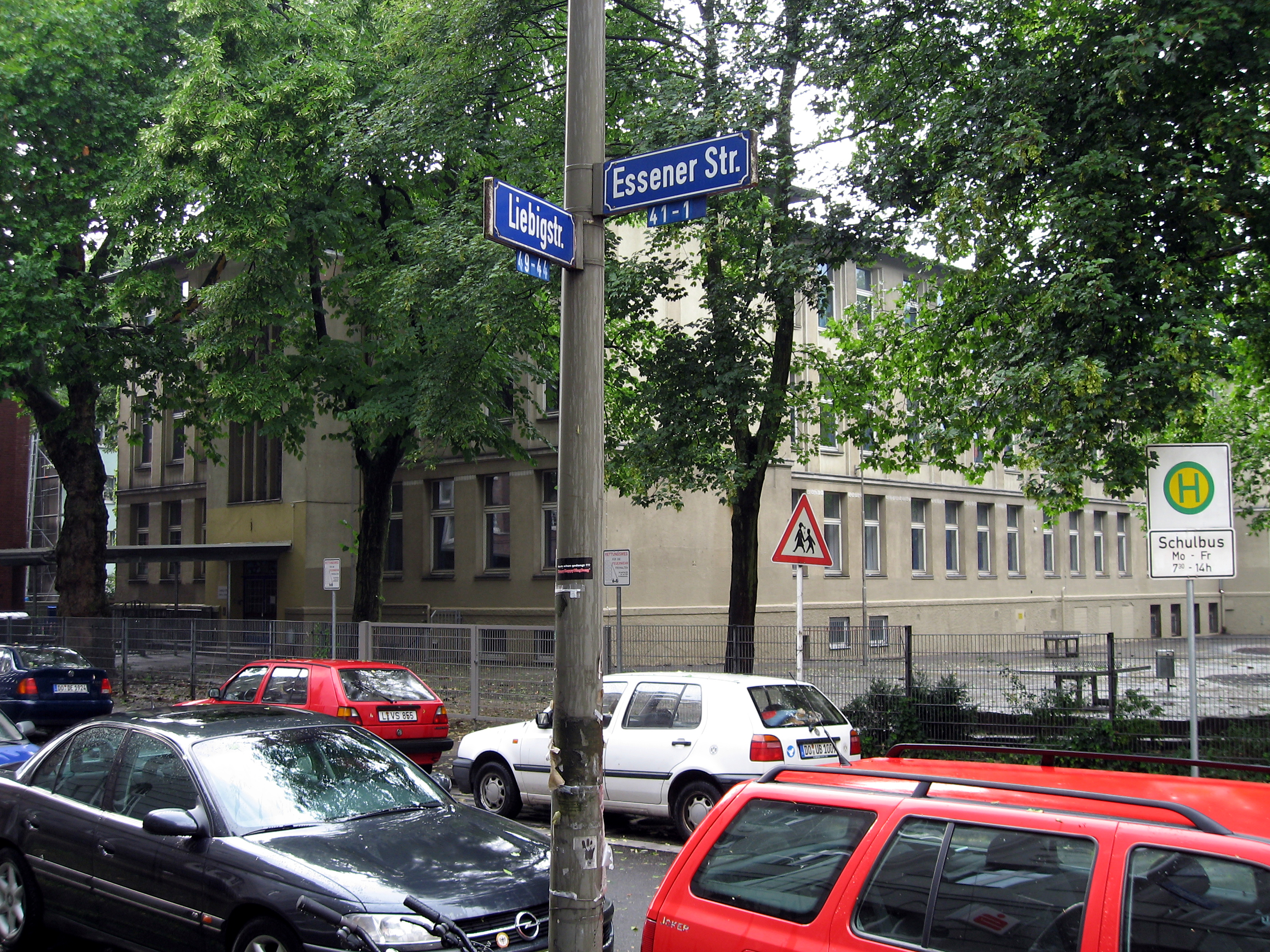 Dortmund, Kreuzviertel, Liebigschule, evangelische Grundschule, im gleichen Gebäude im nördlichen Teil die städtische Peter-Fischer-Schule